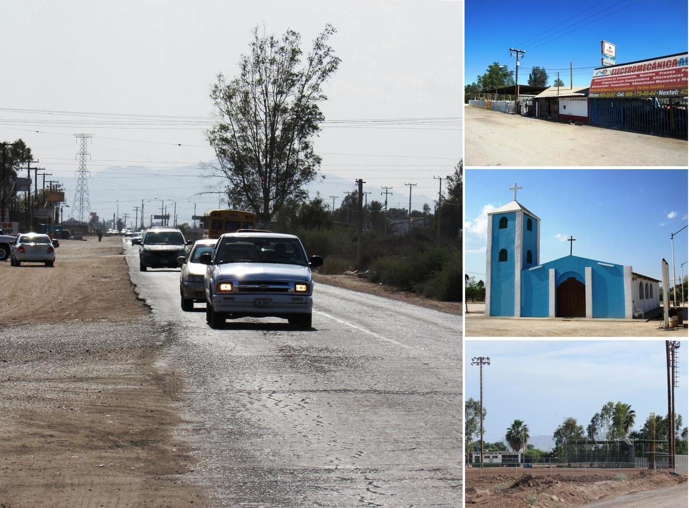 De la imágen principal y en sentido de las manecillas del reloj: La carretera estatal No. 1 de Baja California vista hacia el poniente donde se puede apreciar tenuemente el cerro del Centinela; sobre la misma carretera algunos comercios del ejido Islas agrarias y el expendio de su "junta de mejoras"; la iglesia de nuestra señora de Lourdes, y; el campo de beisbbol de la liga amater de Mexicali que tiene su sede en esta localidad.